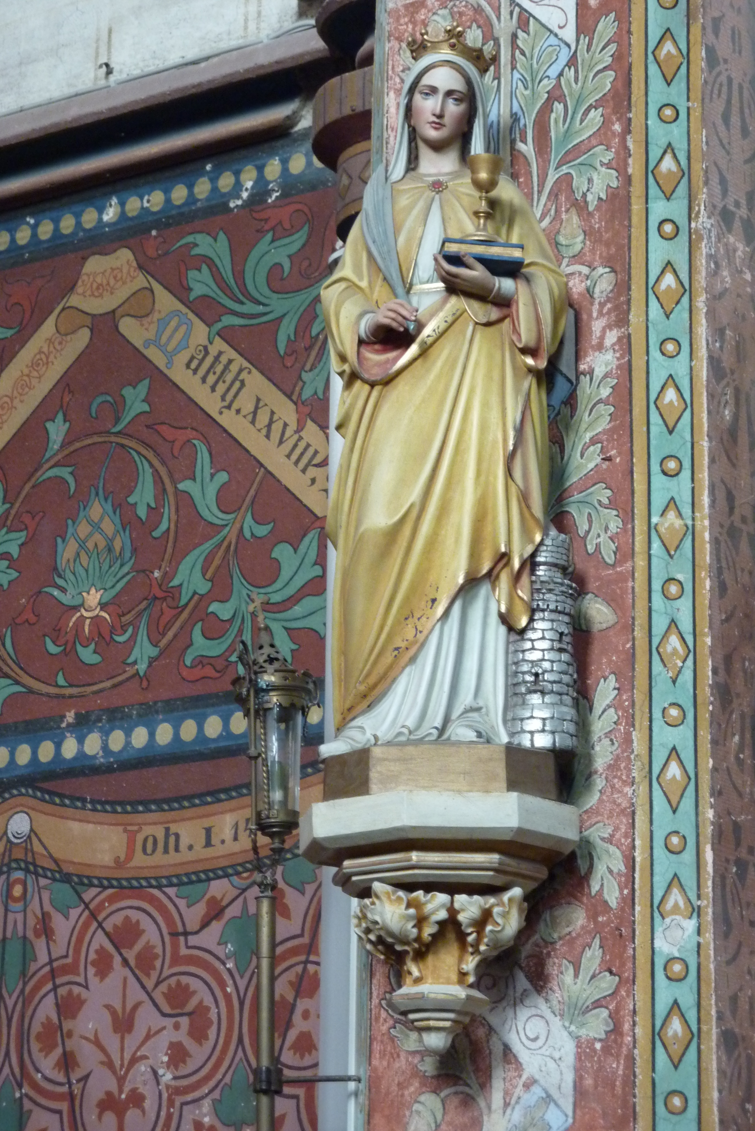 Katholische Kirche St. Barbara in Weibern: Hl. Barbara